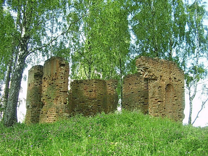 Студзянец. Рэшткі капліцы-пахавальні